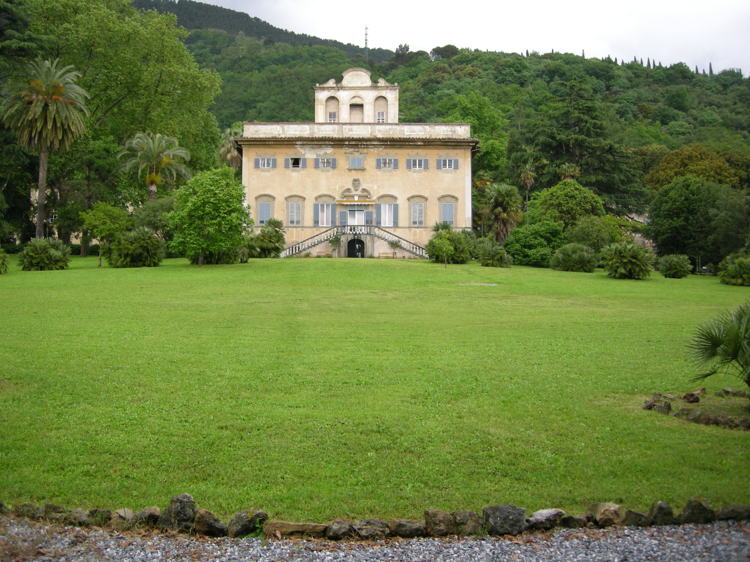 Villa di corliano